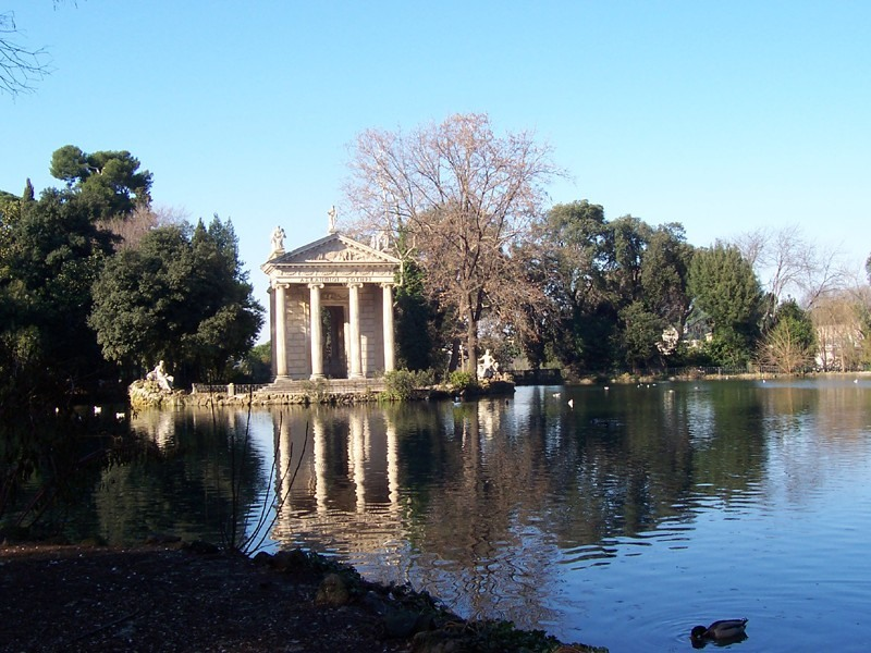 Roma - Laghetto di Esculapio nei Giardini di Villa Borghese